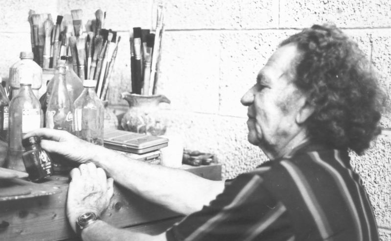 הצייר פנחס אברמוביץ